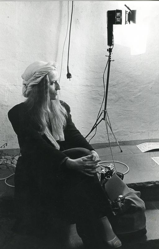 Anna Oppermann, Photo: Elke Walford, Hamburg, 1985